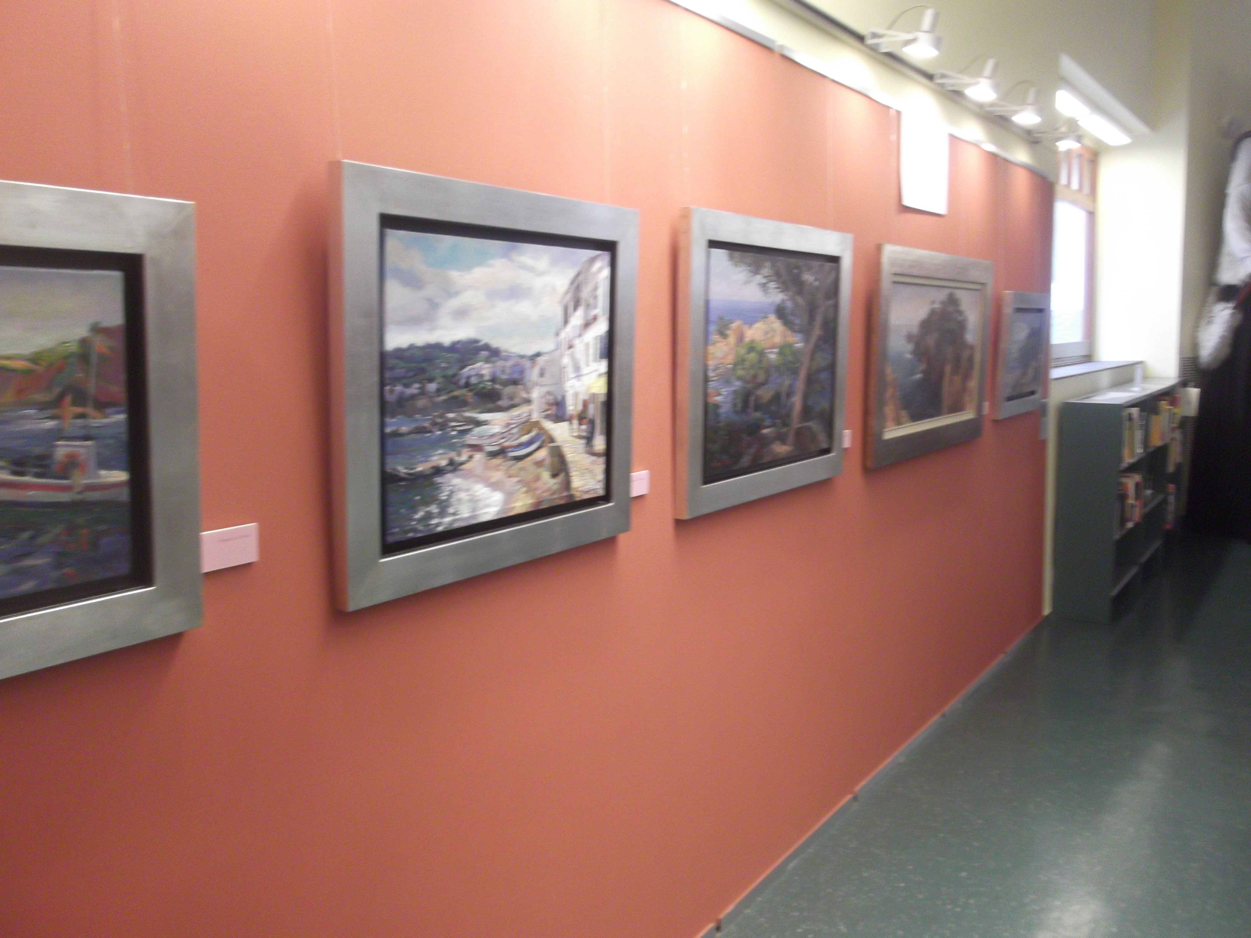 Una exposició d'Arteca la tardor de 2012